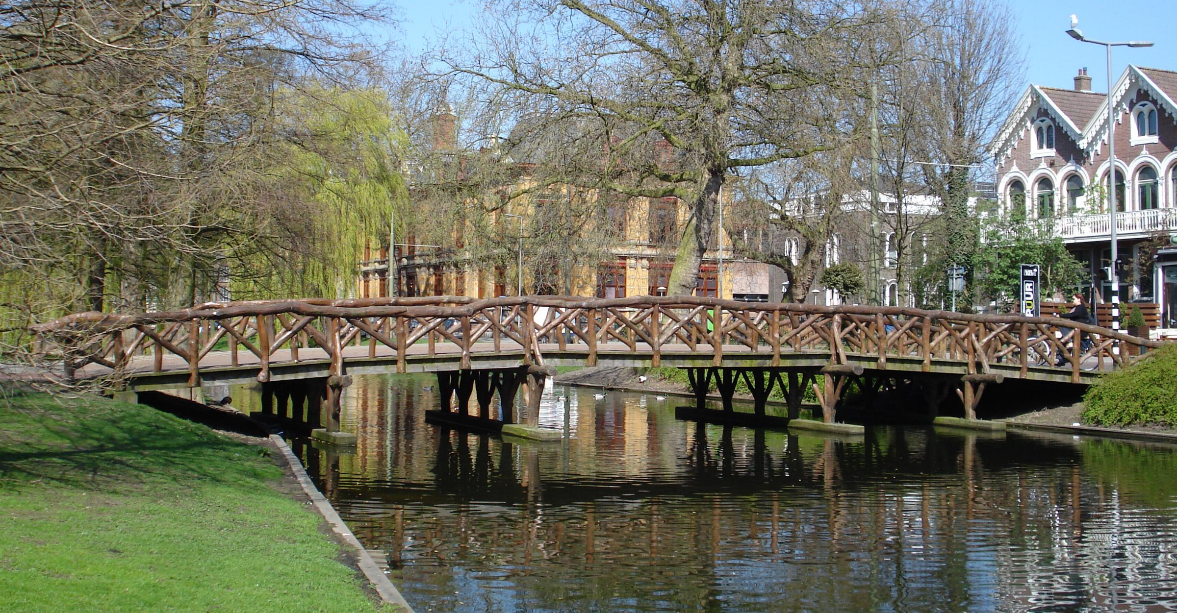 Rotterdam,Noordsingel. Burgemeester Roosbrug. Gemeentemonument.